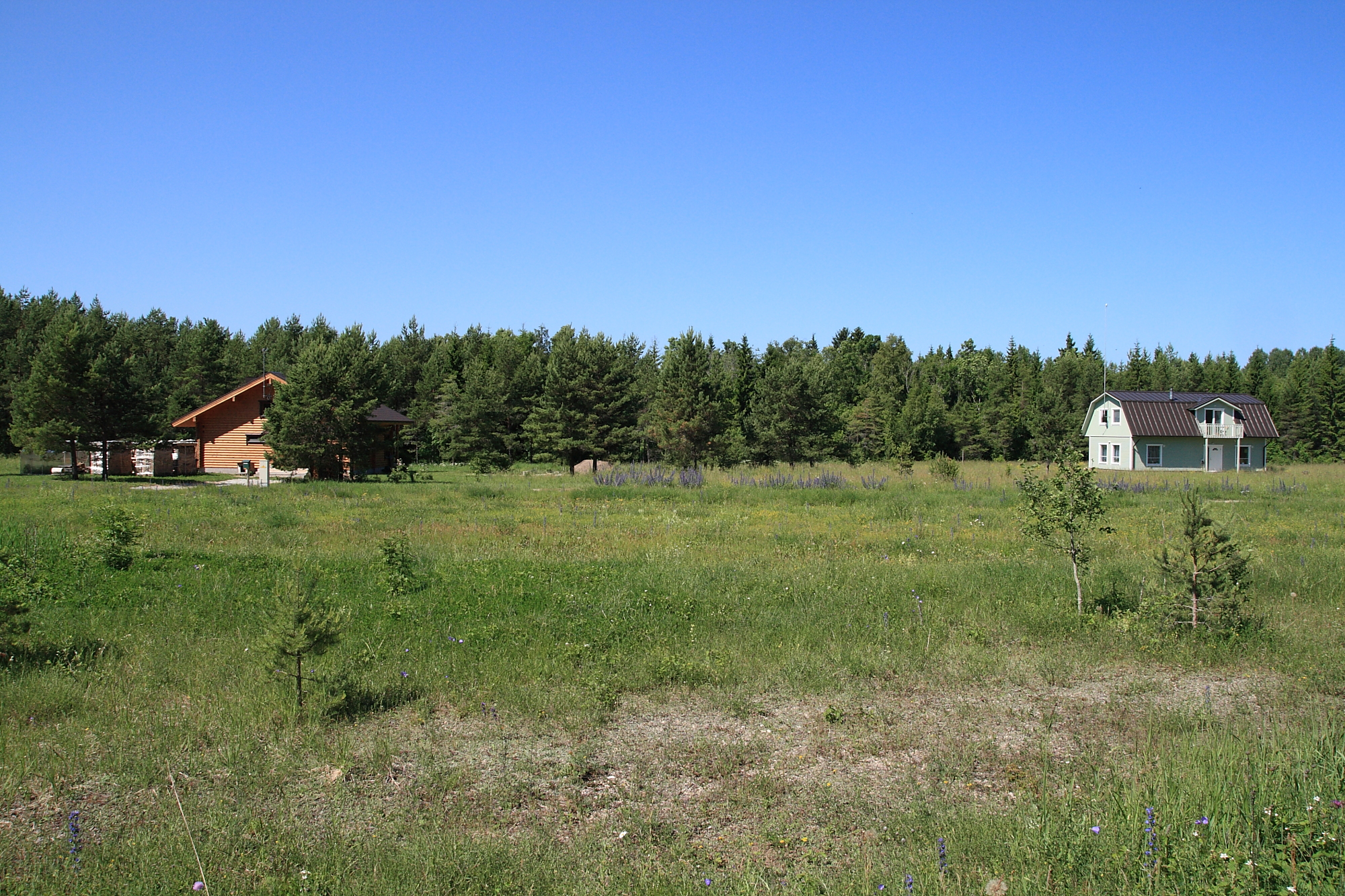 Põllküla